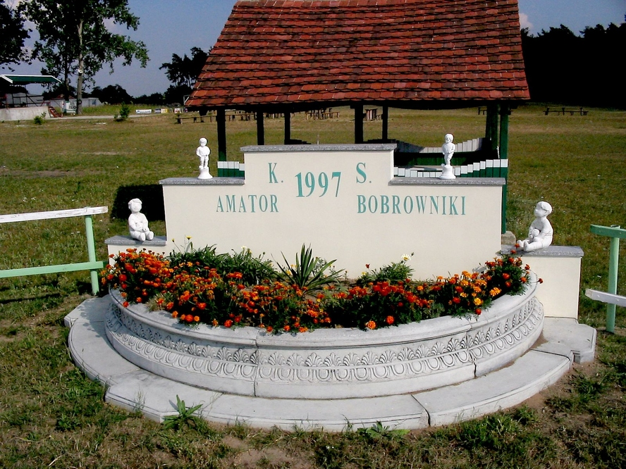 Stadion klubu sportowego "KS Amator Bobrowniki"